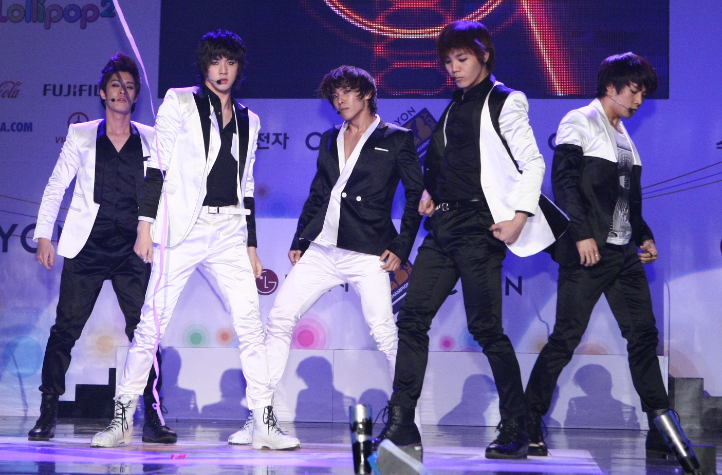 LG전자, ‘CYON 비보이 챔피언십 2010’ 본선 개최 LG전자가 29일 저녁 잠실 올림픽공원에서 ‘제 4회 CYON 비보이 챔피언십 2010’ 본선대회를 열었다. ‘07년에 시작된 이 행사는 올해로 4회째를 맞는 명실상부 국내 최대 비보이 축제로 자리잡았다. 이날 행사에서는 3,000여 명의 관람객들이 참석한 가운데, 비보이들의 화려한 댄스 배틀과, 은지원, 에픽하이, 타이거JK, 윤미래, 앰블랙, 슈프림팀 등 국내 인기 가수들이 참여한 ‘롤리팝 콘서트’가 함께 진행됐다.